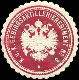 Sealing stamp Title: K.u.K. Gebirgsartillerieregiment No. 3 Description: rotbraun, weiß, geprägt Place: size: 4 cm